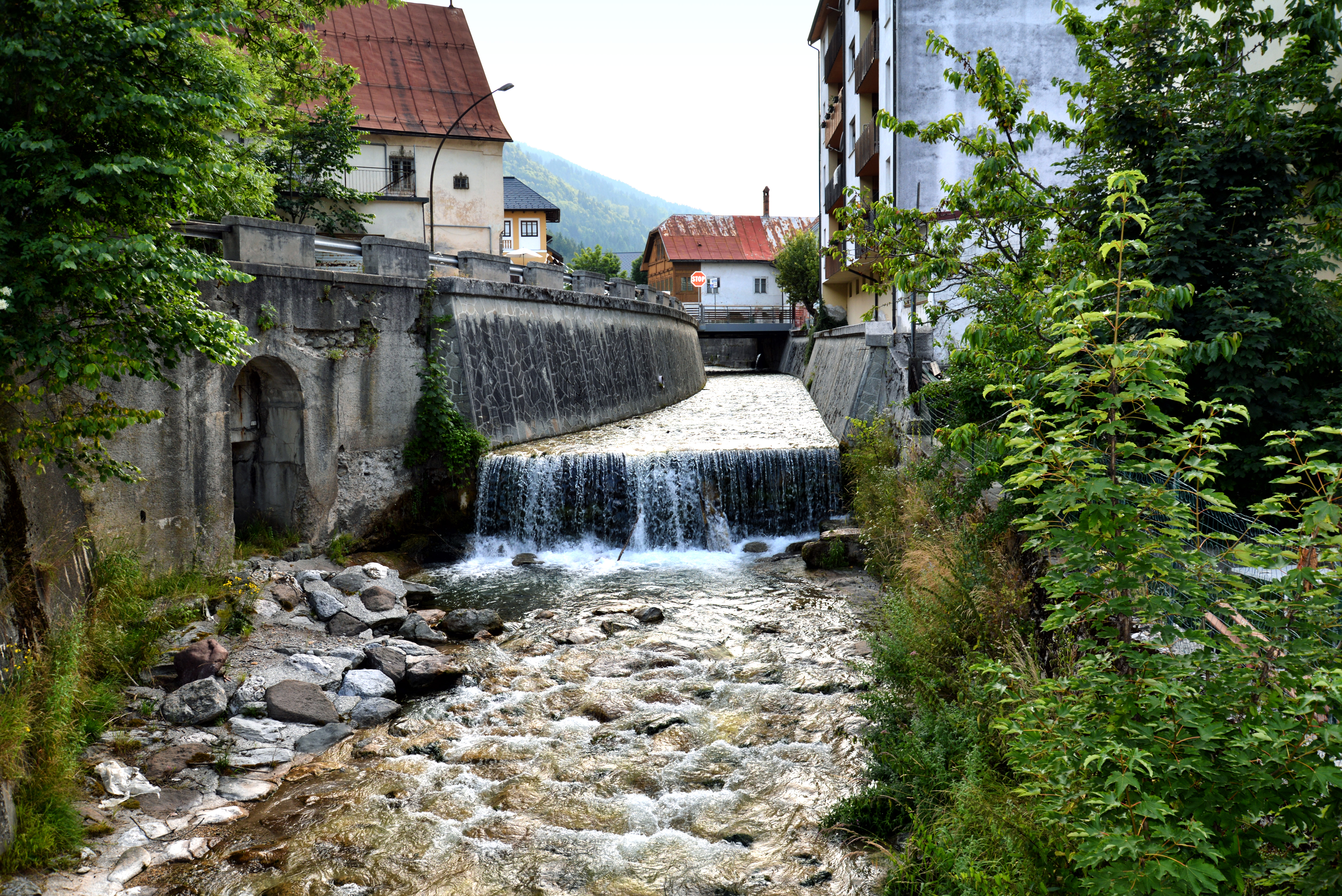 Tarvisio, Frioul-Vénétie (Italie) - La rivière Slizza dans la traversée de Tarvisio